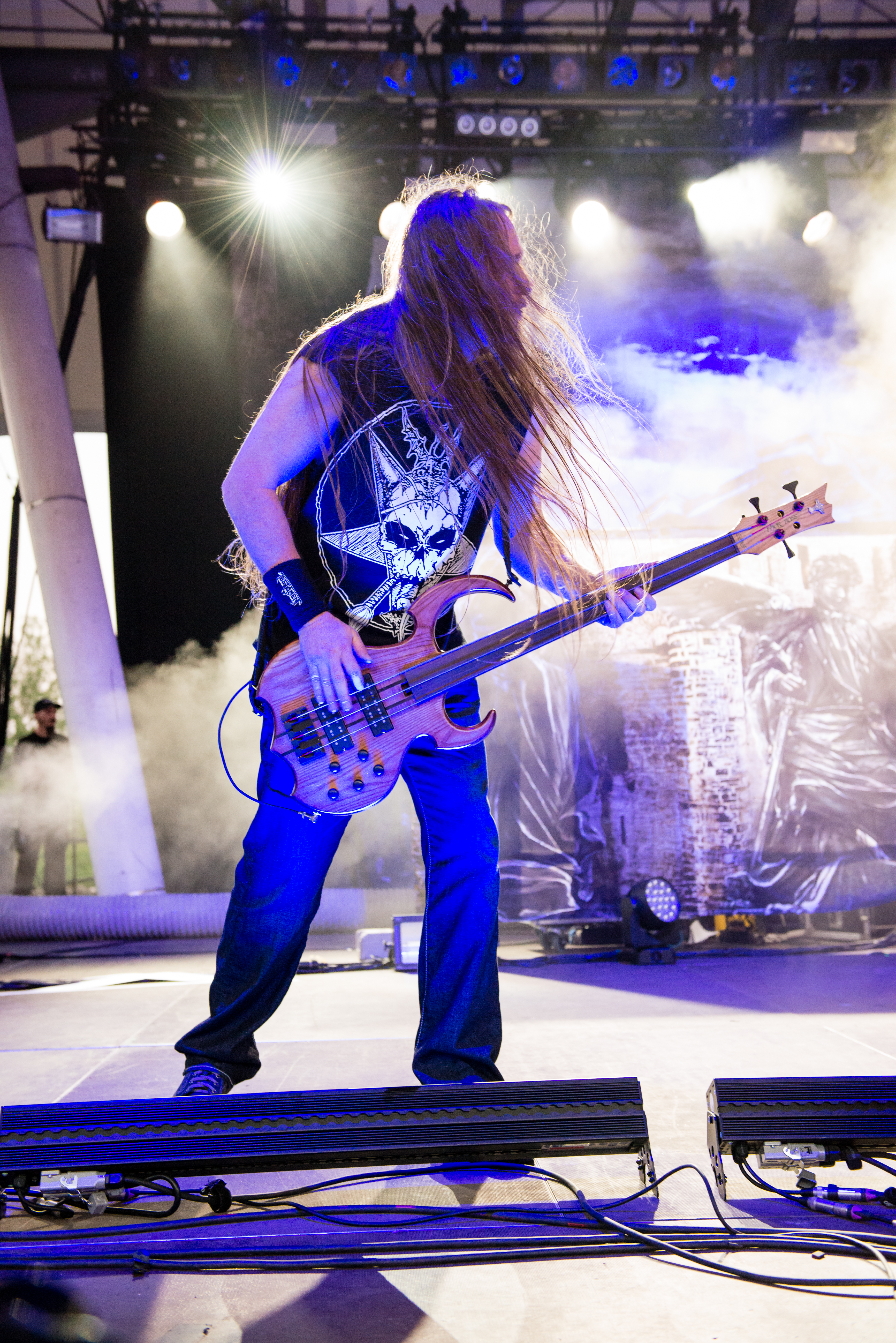 'Rock Hard Festival 2014 - Gelsenkirchen': 'Testament'